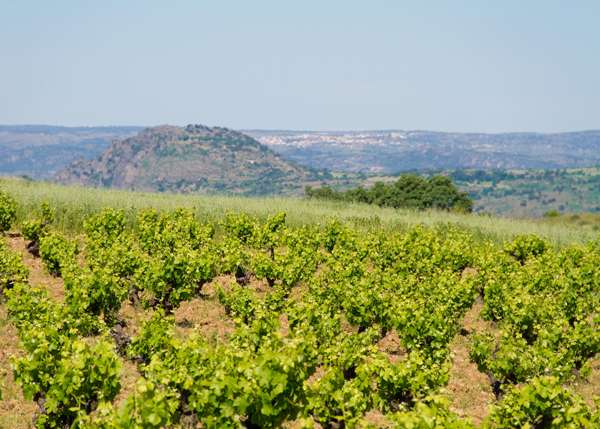 Campo de vides en Corporario, Aldeadávila de la Ribera, Parque Natural de Arribes del Duero, España.